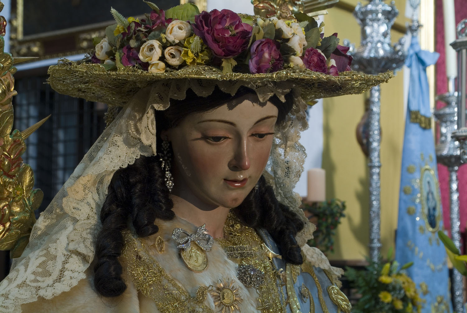 Divina Pastora de las Almas, talla de José Montes de Oca que data de los años treinta del siglo XVIII